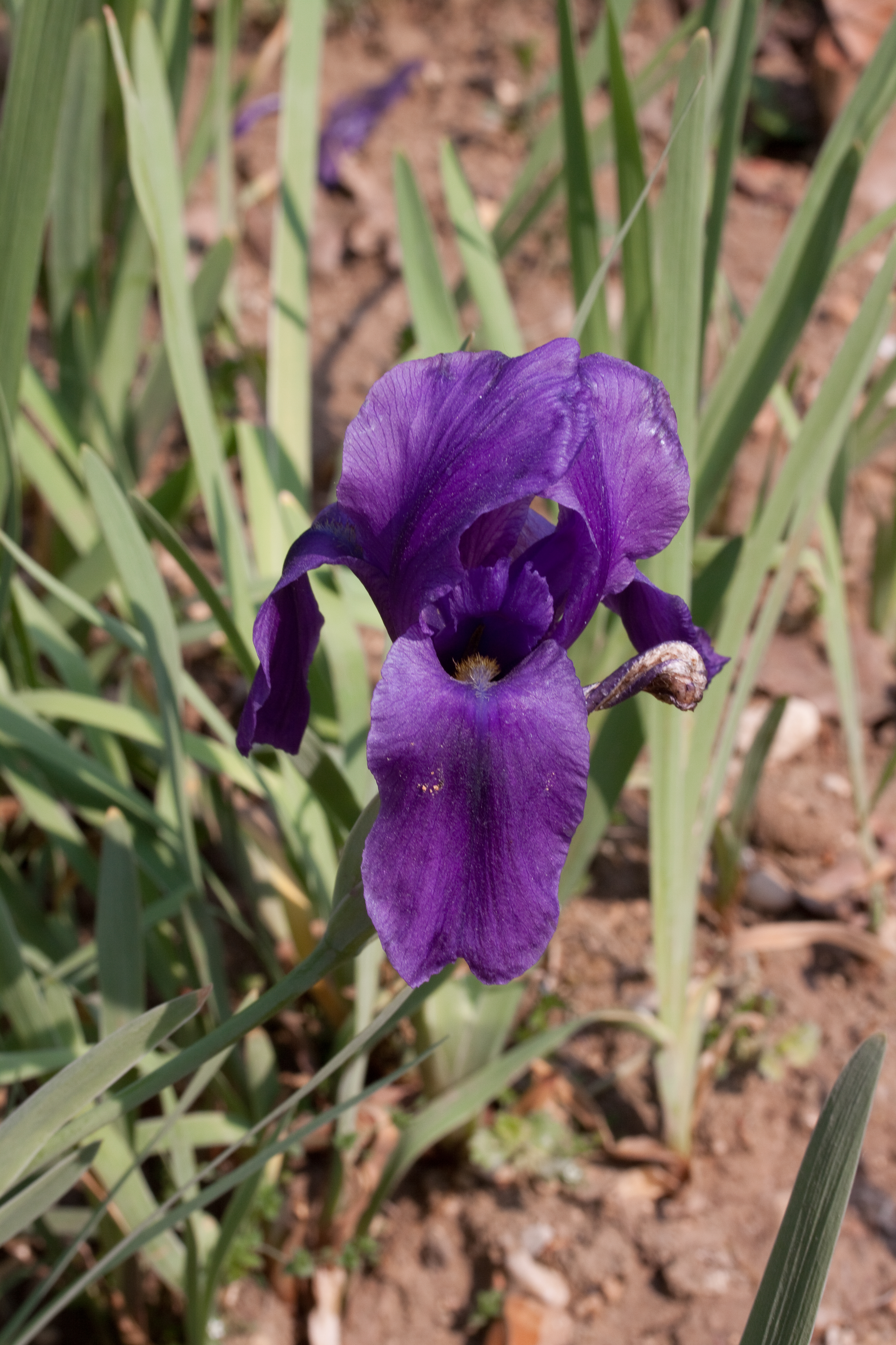 Fleur d'Iris hoogiana au Jardin des Plantes - Paris